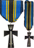 Нагорода УНР. Орден Симона Петлюри